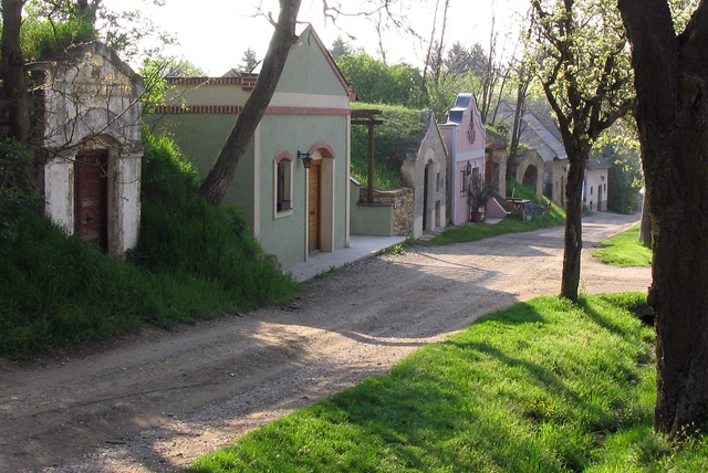 Kellergasse in Ulrichskirchen, Weinviertel